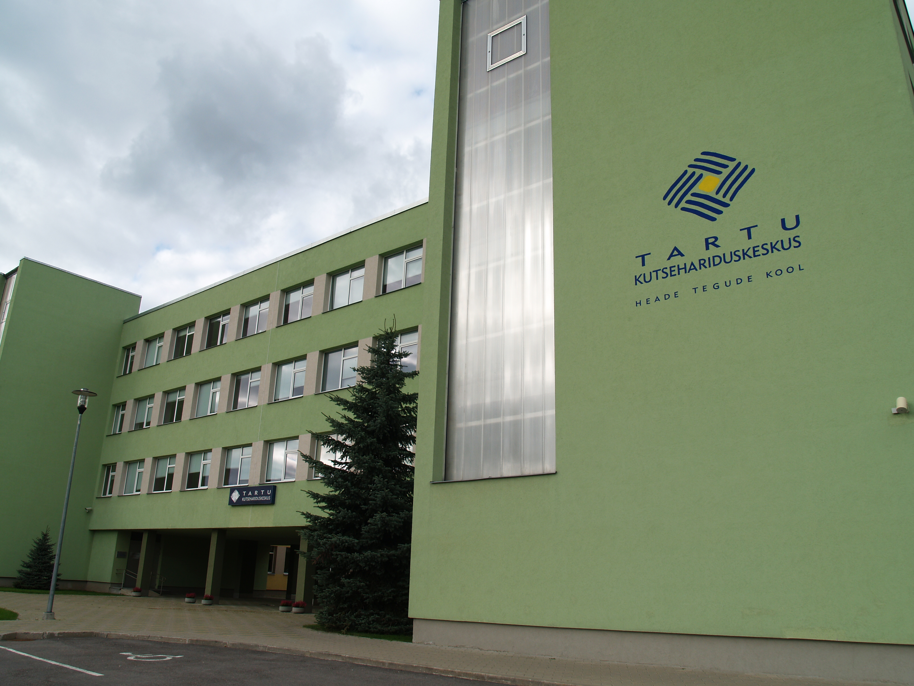 Tartu Kutsehariduskeskus